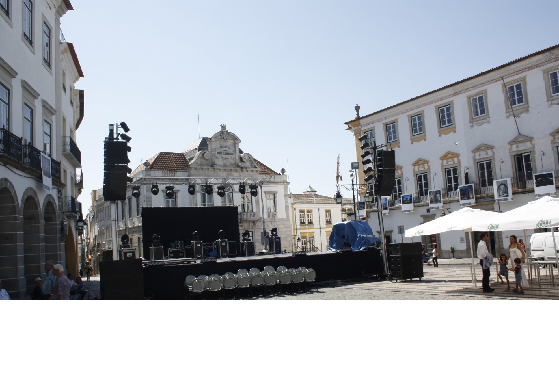 Préparation d'un concert sur la place